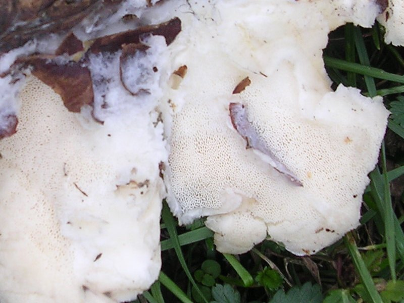 Piemontèis: Tyromyces kmetii, surfassa poròida